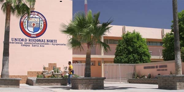 URN